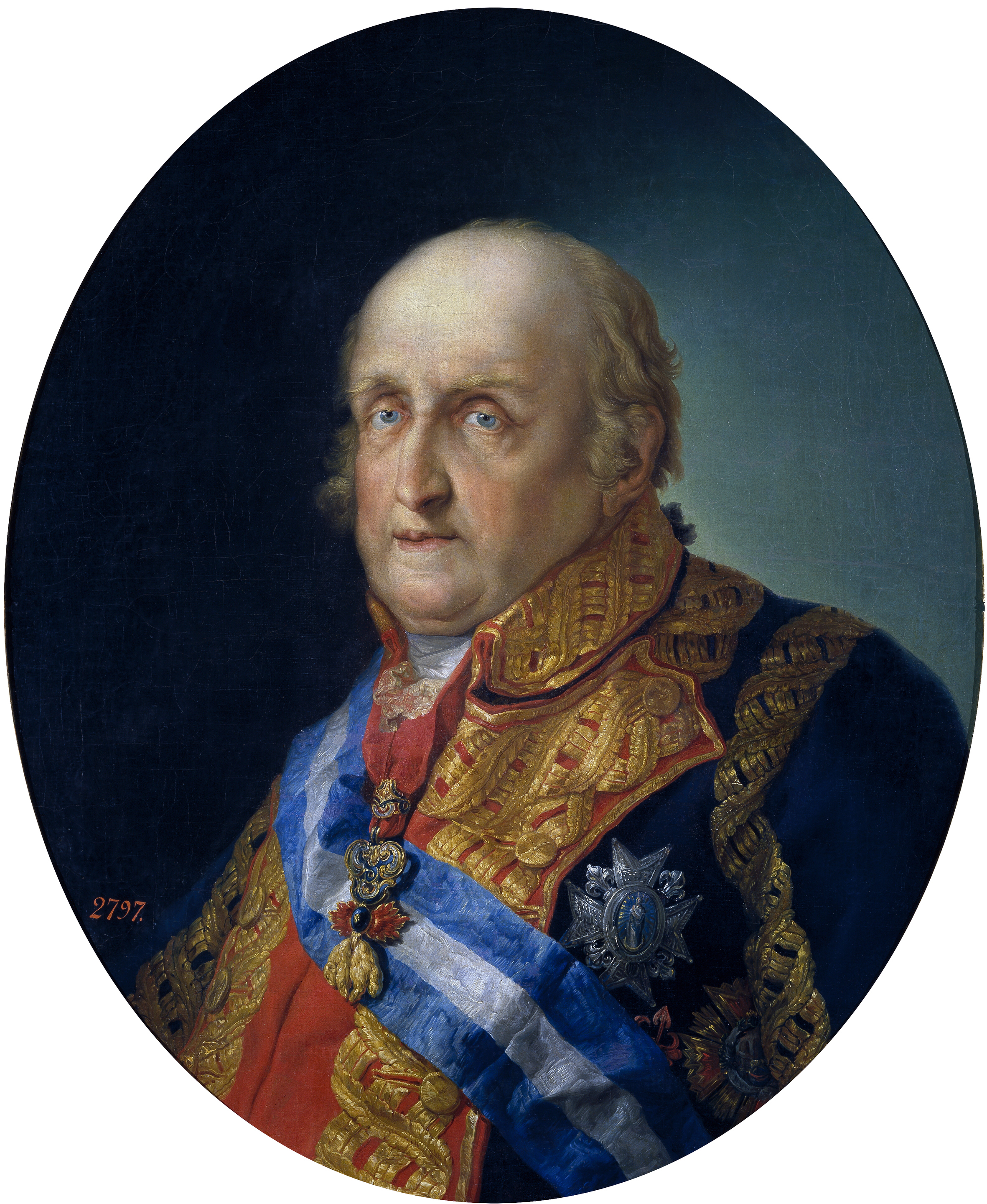 Retrato de Antonio Pascual de España (1755-1817), hijo de Carlos III de España